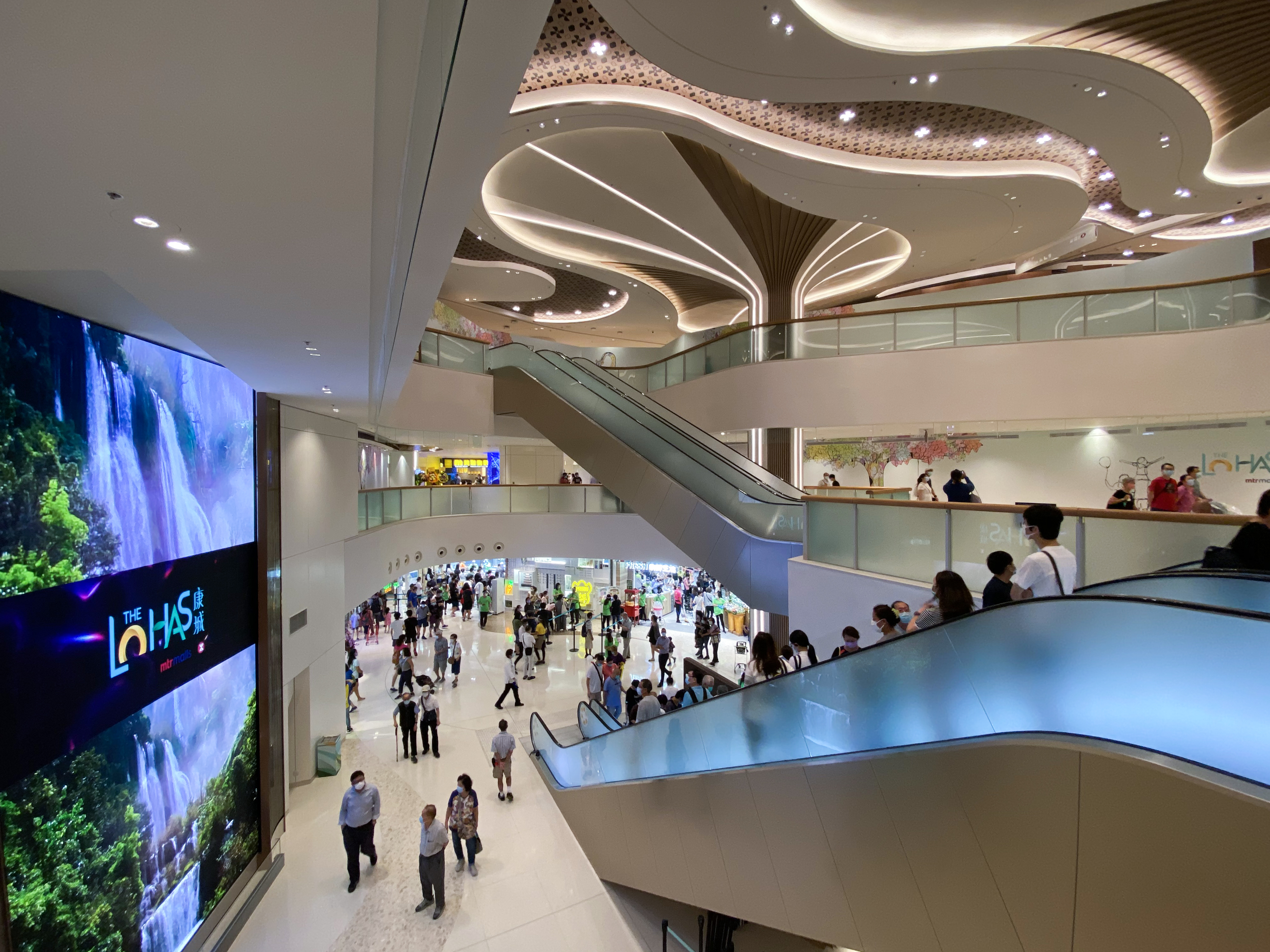 THE LOHAS